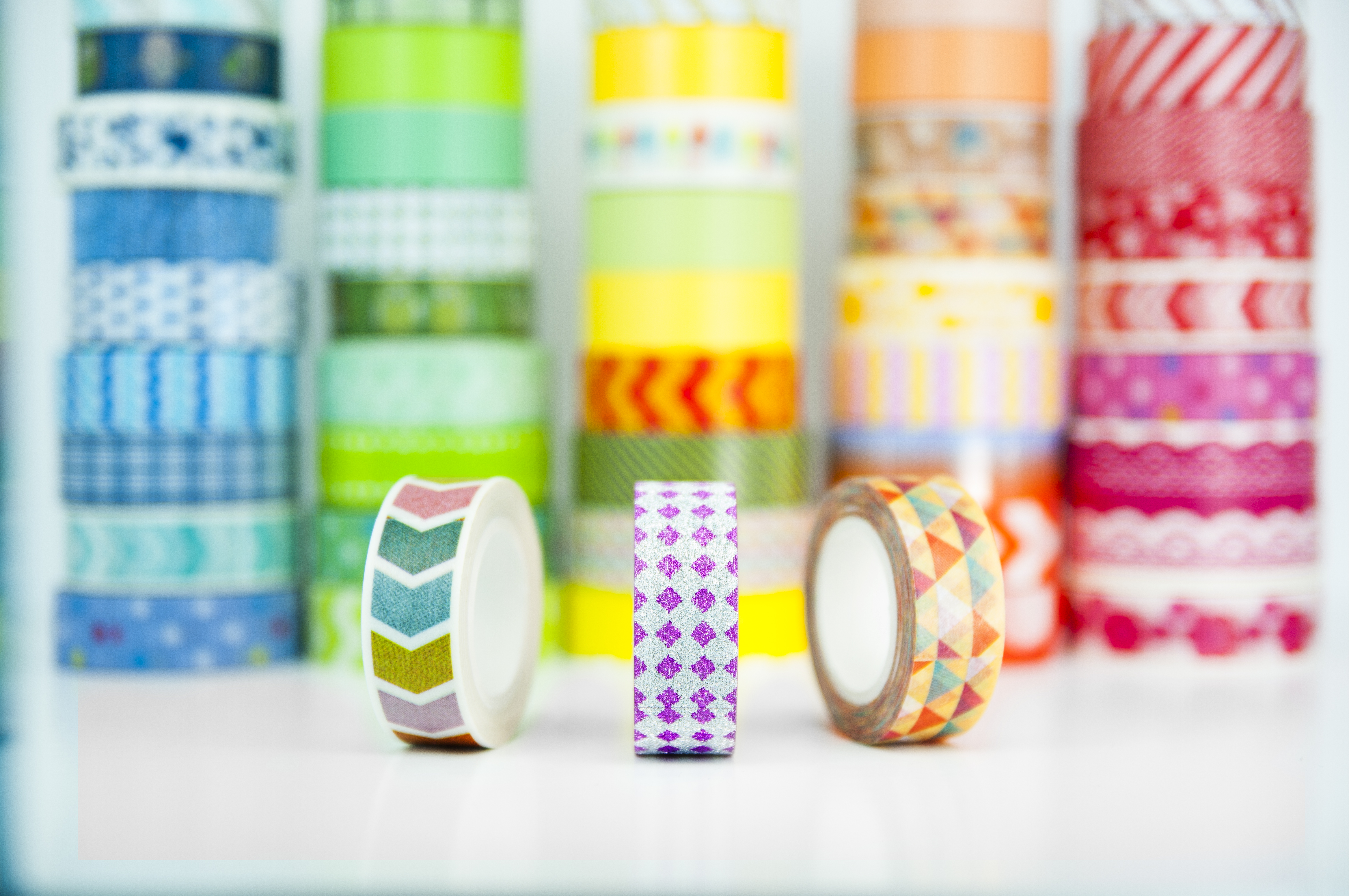 Empilement de Washi Tape de couleurs différentes